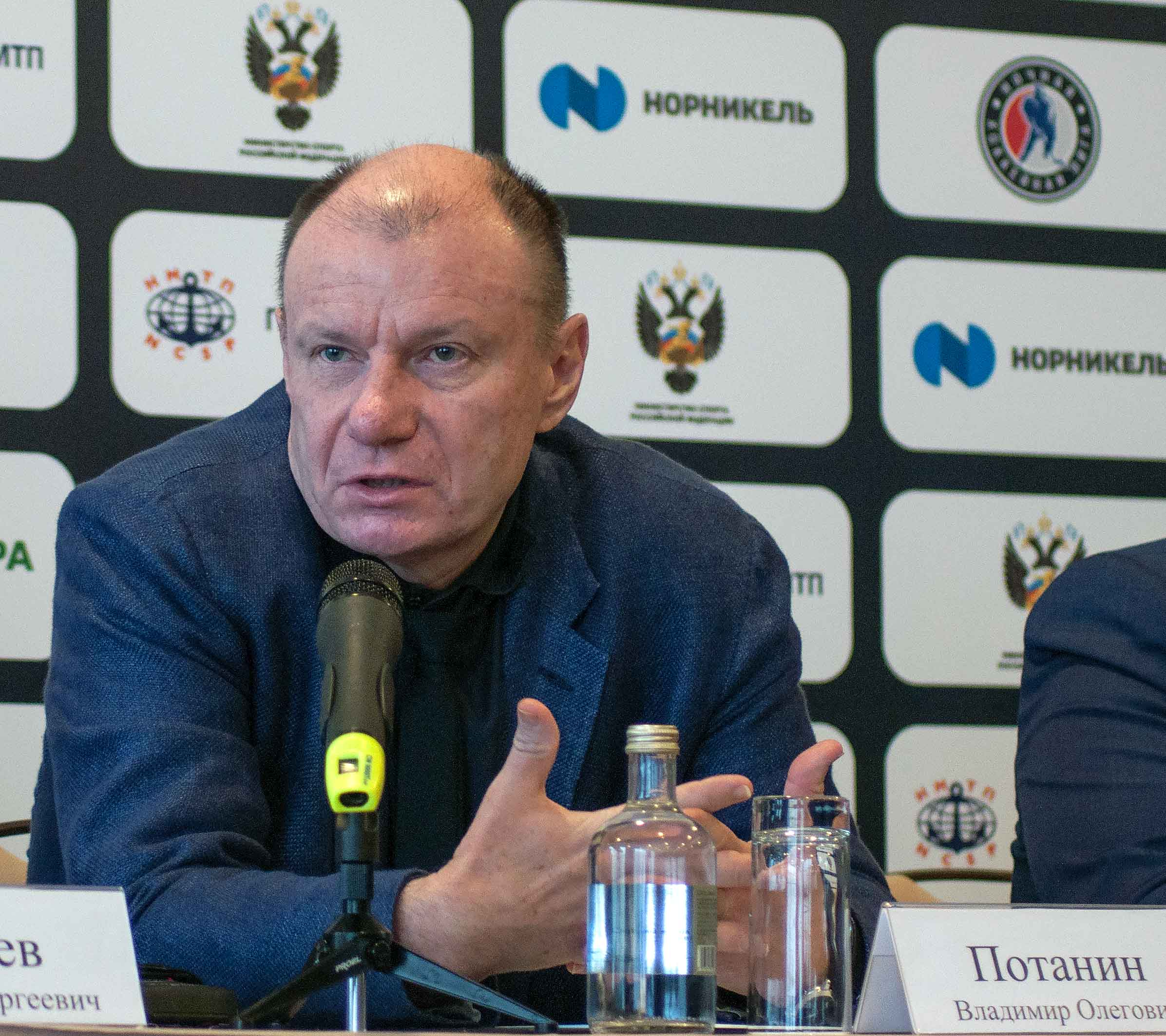 Пресс-конференция Ночной Хоккейной Лиги